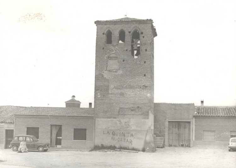 Iglesia de San Juan Bautista - Fuente el Sol (Valladolid) - Iglesia de Fuente el Sol. Antiguo torreón campanario mudéjar. Curioso grafiti en la base. - Fotografía 122 x 90 B/N